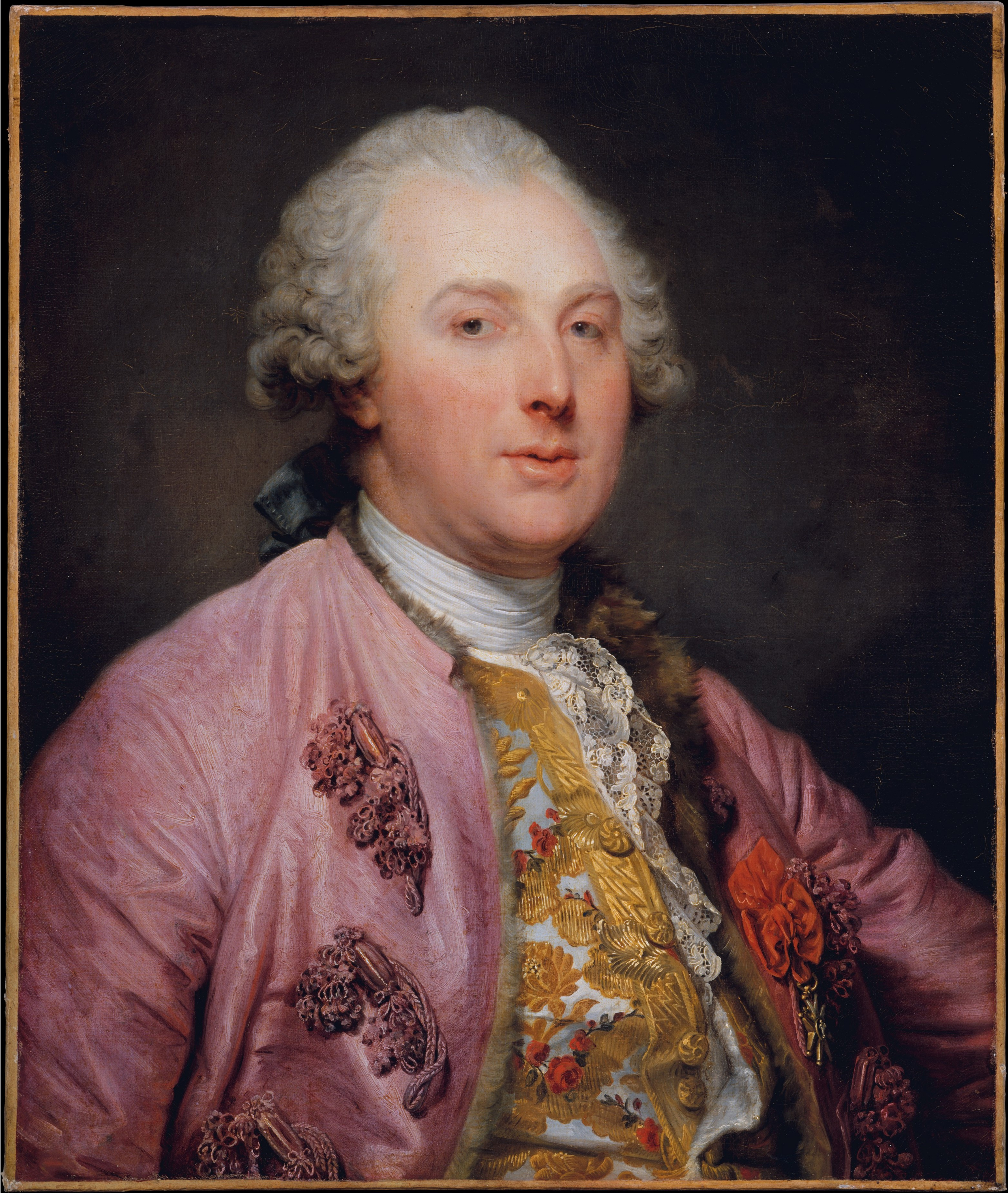 Portrait de Charles Claude Flahaut de La Billarderie, comte d'Angiviller (1730-1810), portant l'insigne de l'ordre de Saint-Louis